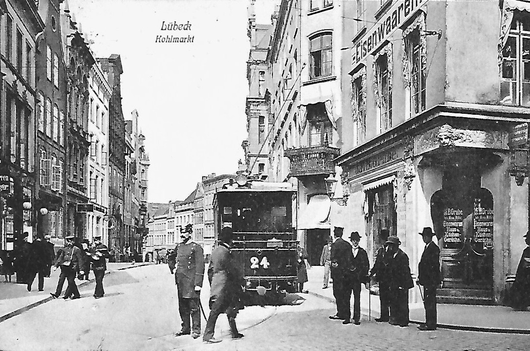 Ein Blick den Kohlmarkt herab.